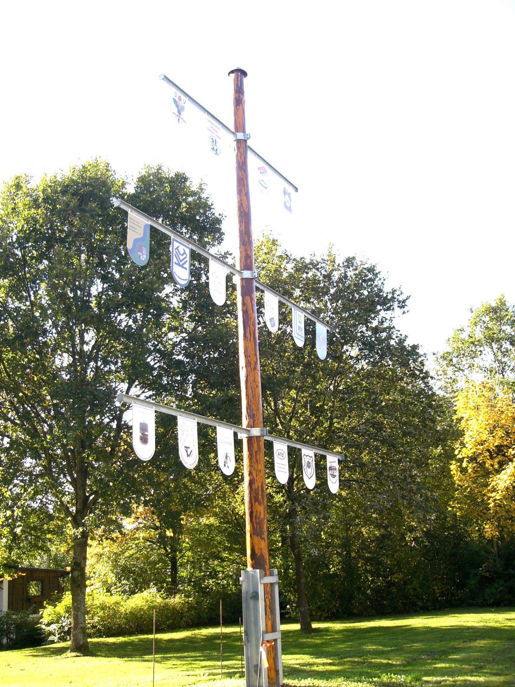 Vereinsbaum im Langeneier Park mit Vereinslogos